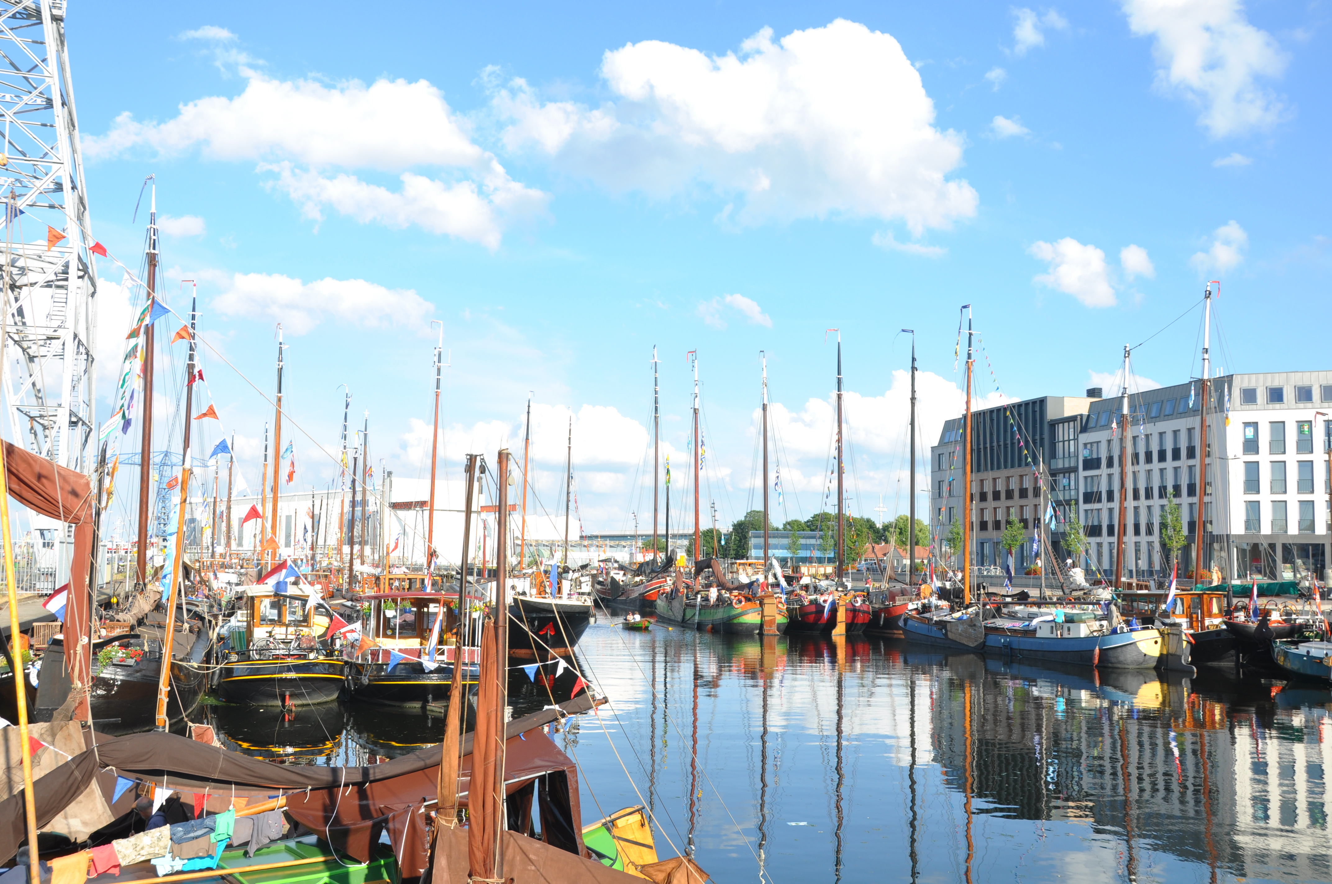 Een generale repetitie voor het komend Sail De Ruyter.